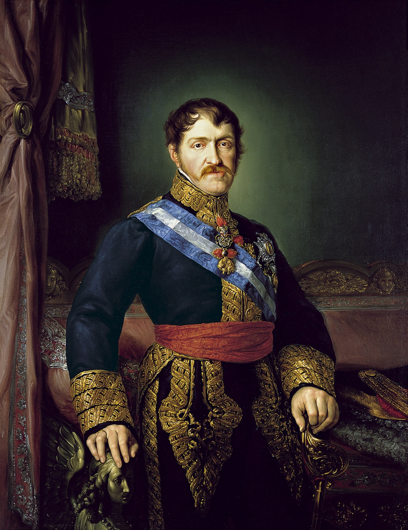 Retrato del infante de España Carlos María Isidro de Borbón (1788-1855), que fue hijo del rey Carlos IV de España y hermano de Fernando VII. Y a la muerte de este ultimo, disputó el trono de España a su sobrina, Isabel II, en el enfrentamiento conocido como la Primera Guerra Carlista, que finalizó en 1839 con el Abrazo de Vergara.